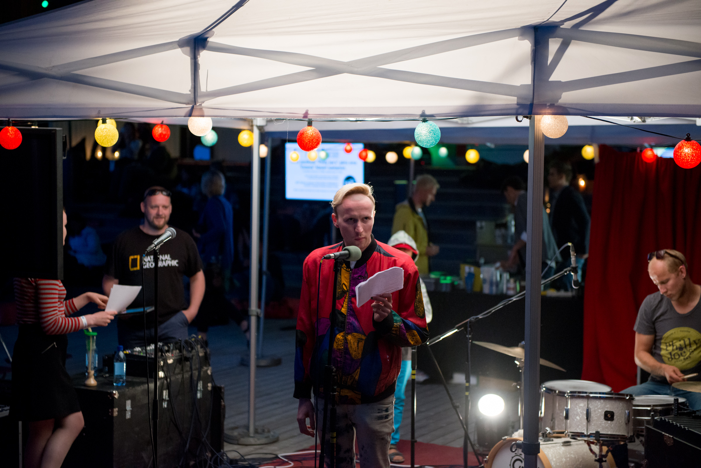 Digiluule Slam Arvamusfestivali kohvikualal